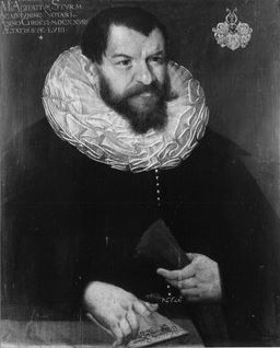 Ölgemälde in der Tübinger Professorengalerie